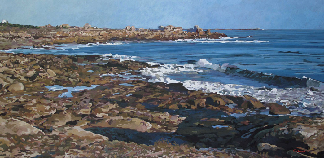 From th Goudoul to Lesconil